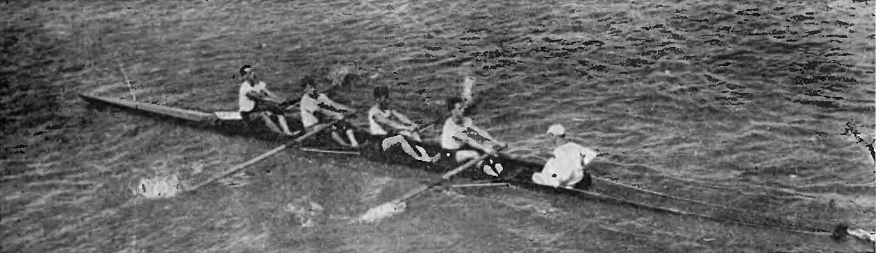 Czwórka AZS Warszawa ze stęrnikiem w 1924: Władysław Nadratowski, Stefan Piątkowski, Piotr Kurnicki, Henryk Niezabitowski, Otto Gordziałkowski